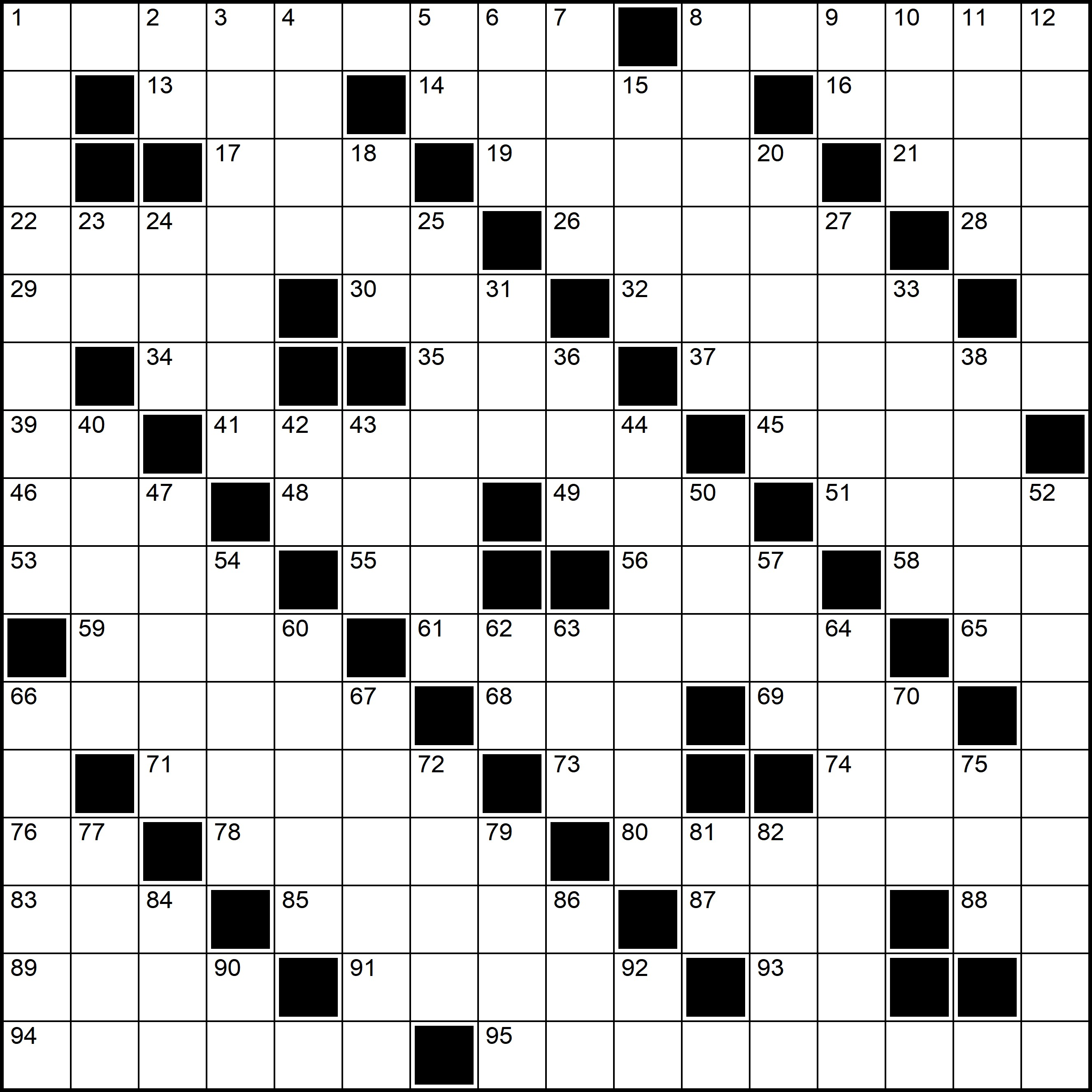 Frysk krúswurddiagram mei hokjes yn Italjaanske styl